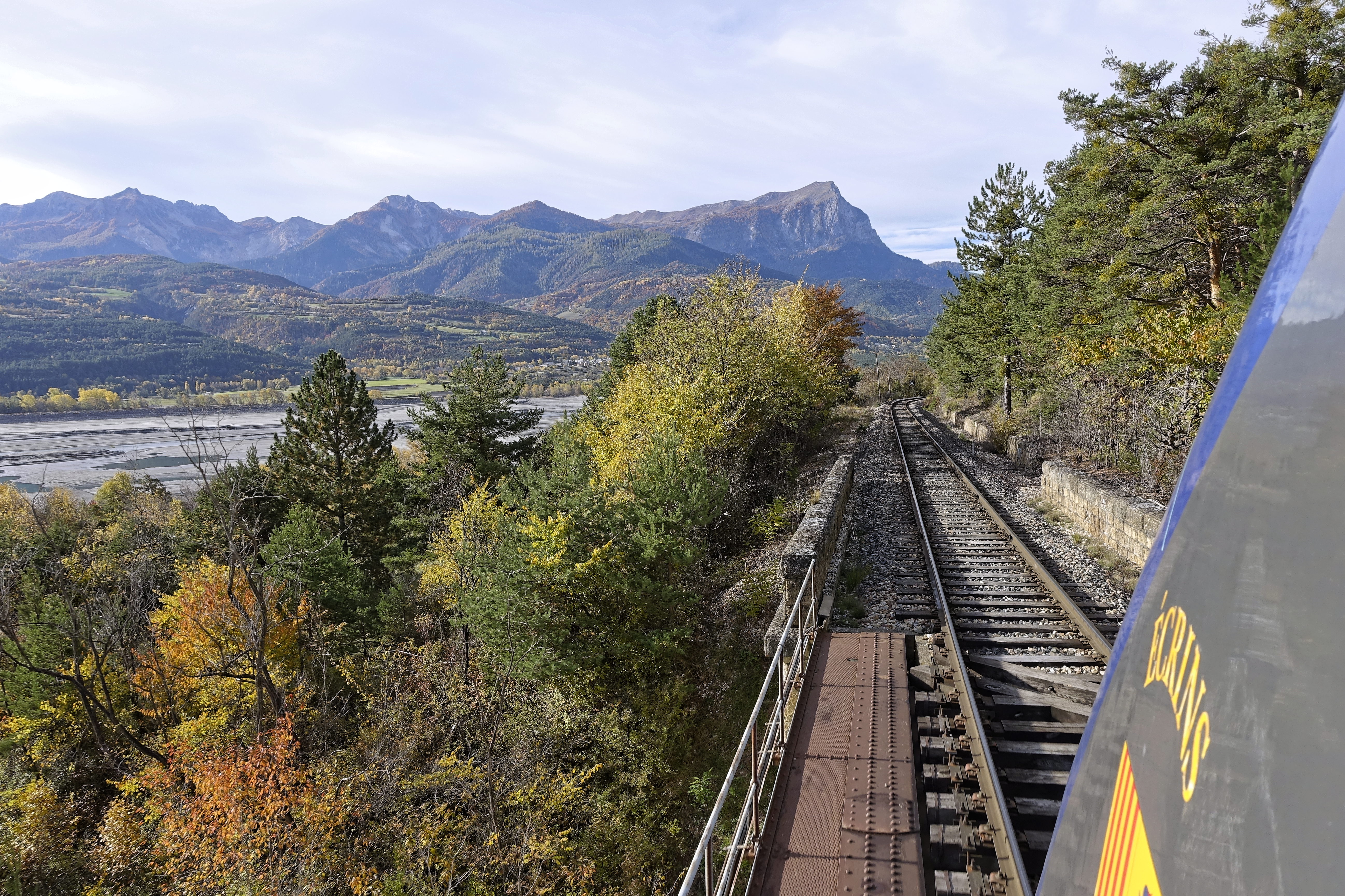 Vue automnale de la ligne qui serpente le long du lac de Serre-Ponçon, depuis la cabine de conduite d'un X 72500.